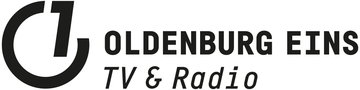 Neues Senderlogo seit 2016